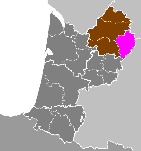 Maps of arrondissements and cantons of France: Département de la Dordogne - Arrondissement de Sarlat-la-Canéda.PNG (Région Aquitaine)